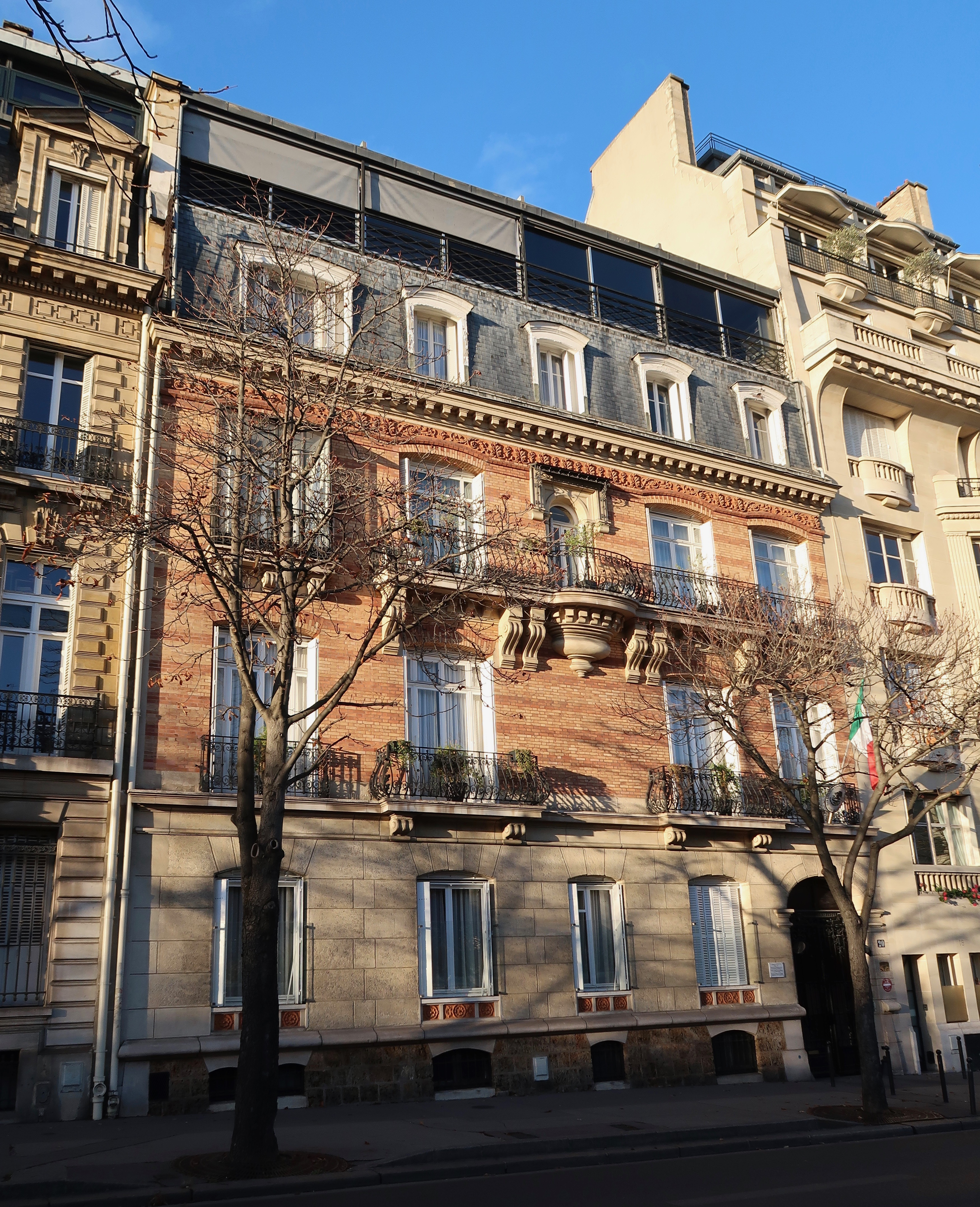 Résidence de l'ambassade du Mexique en France côté avenue du Président-Wilson, n°20 (Paris, 16e).